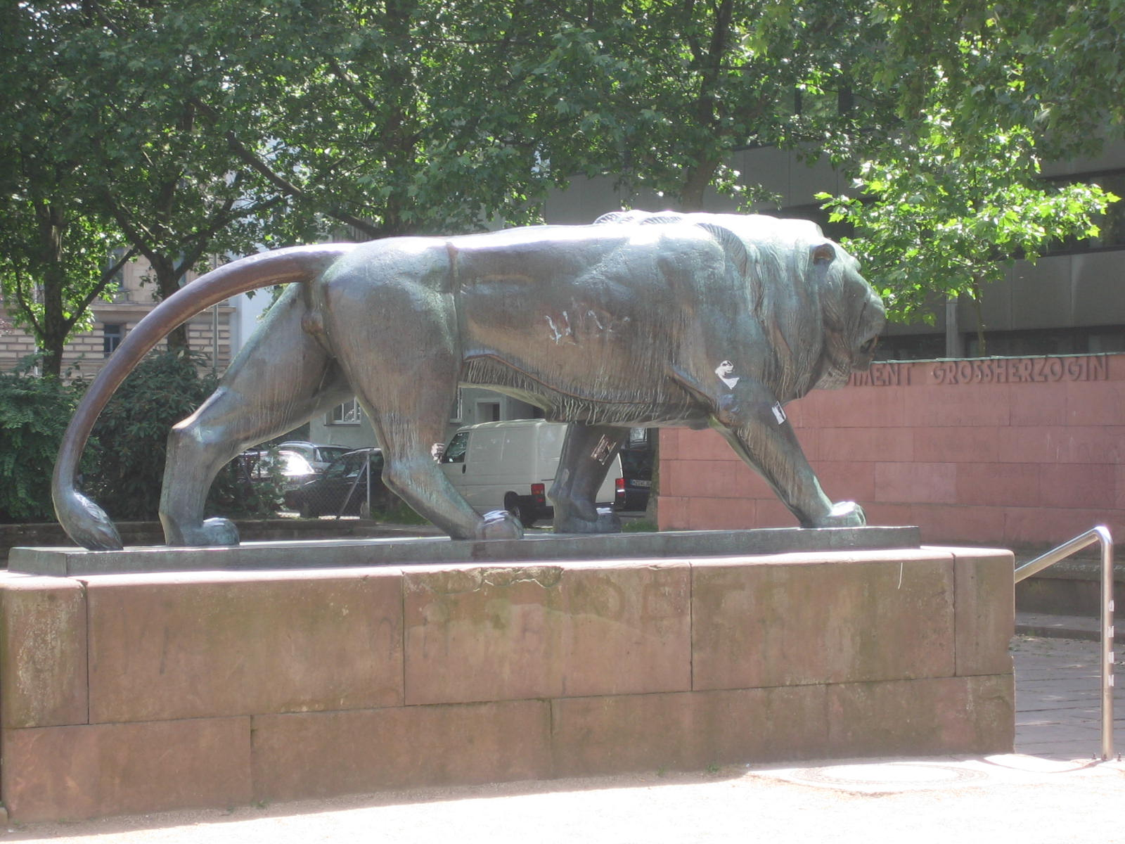 Großherzoglich-Hessischer Loewe